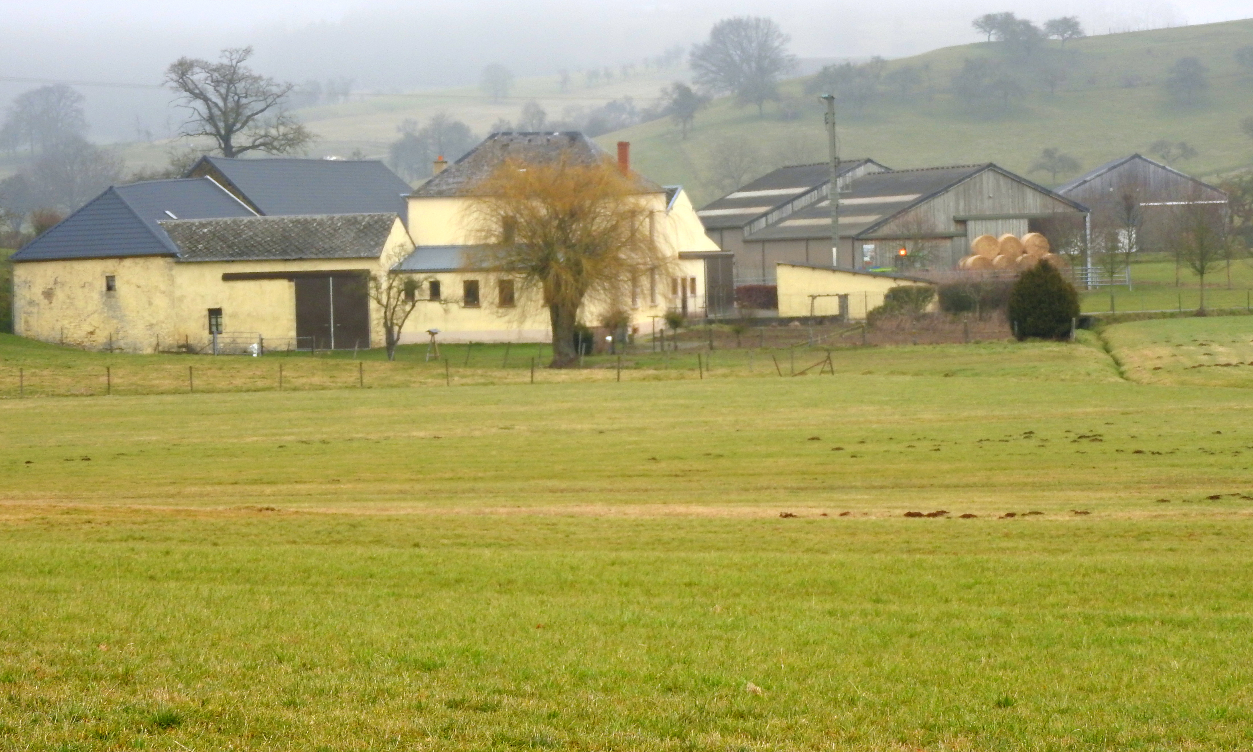 Zëtteger Millen